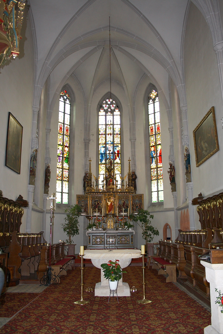 Altar und Chor der Pfarrkirche der niederösterreichischen Gemeinde Hainfeld.